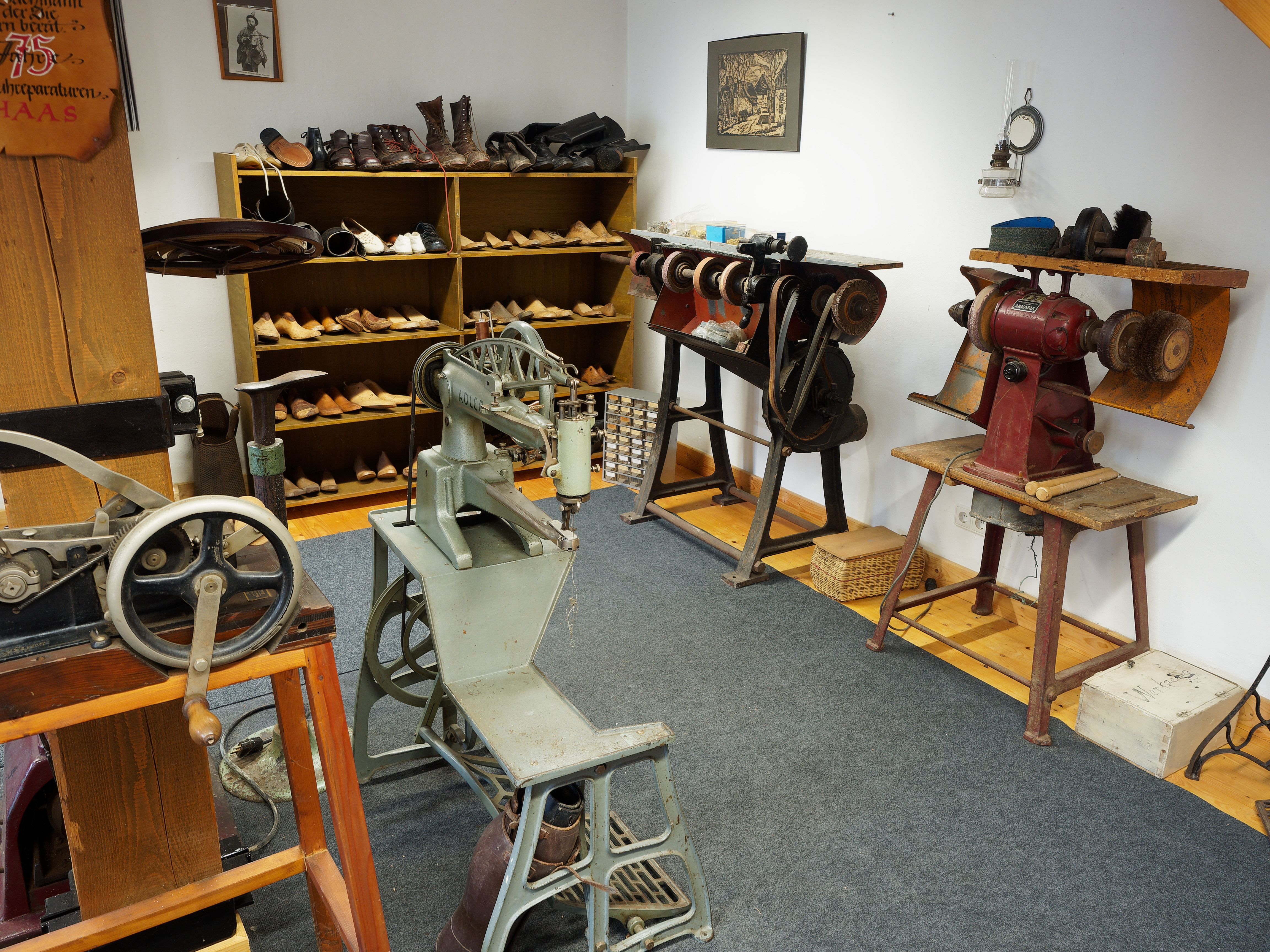 Nähmaschine in der ausgestellten Schusterwerkstatt im Haferkasten in Wiblingwerde.